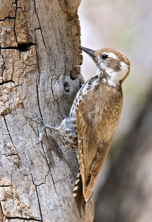 Arizona Woodpecker Female